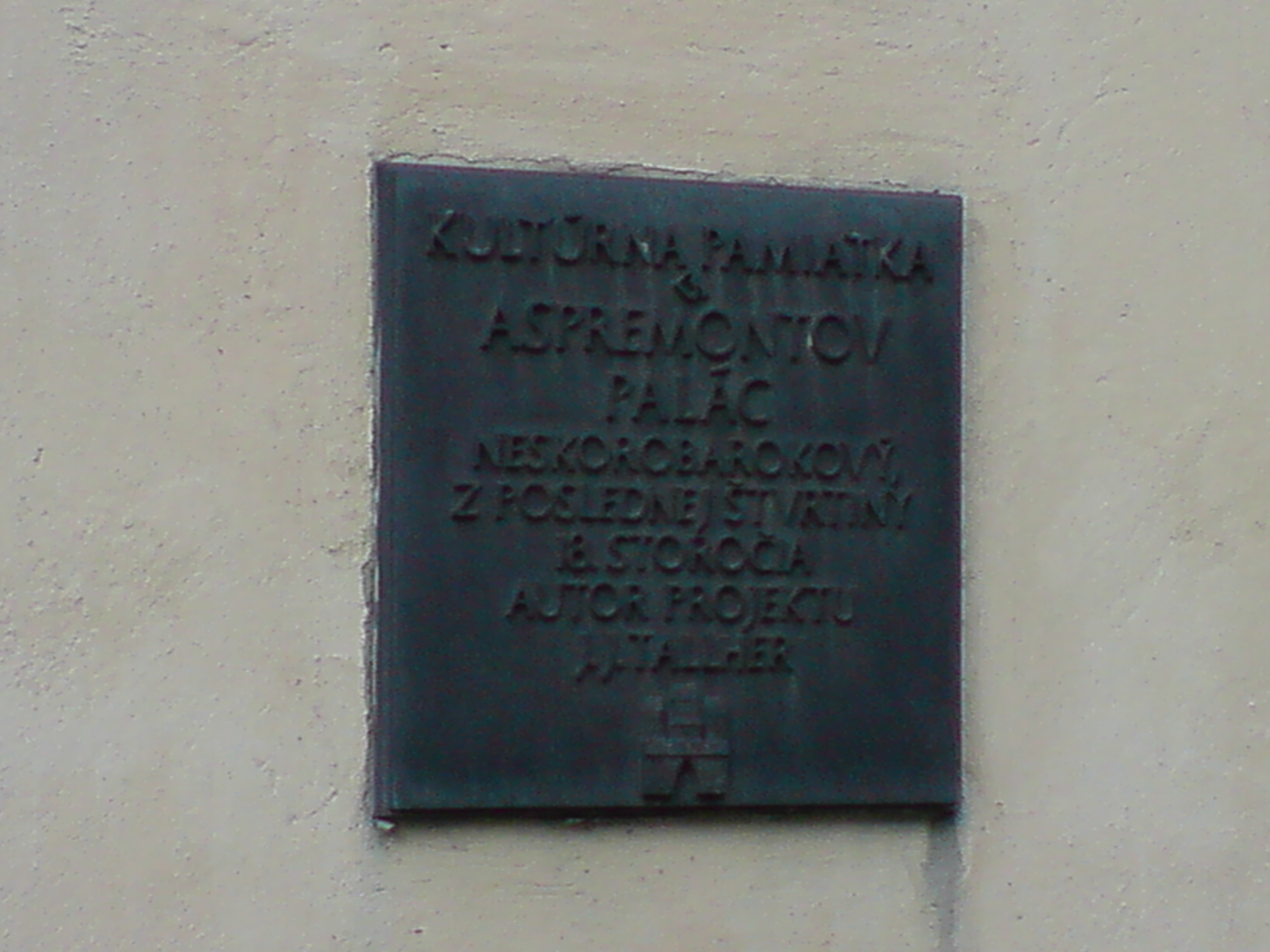 Aspremontov letný palác, tabuľa